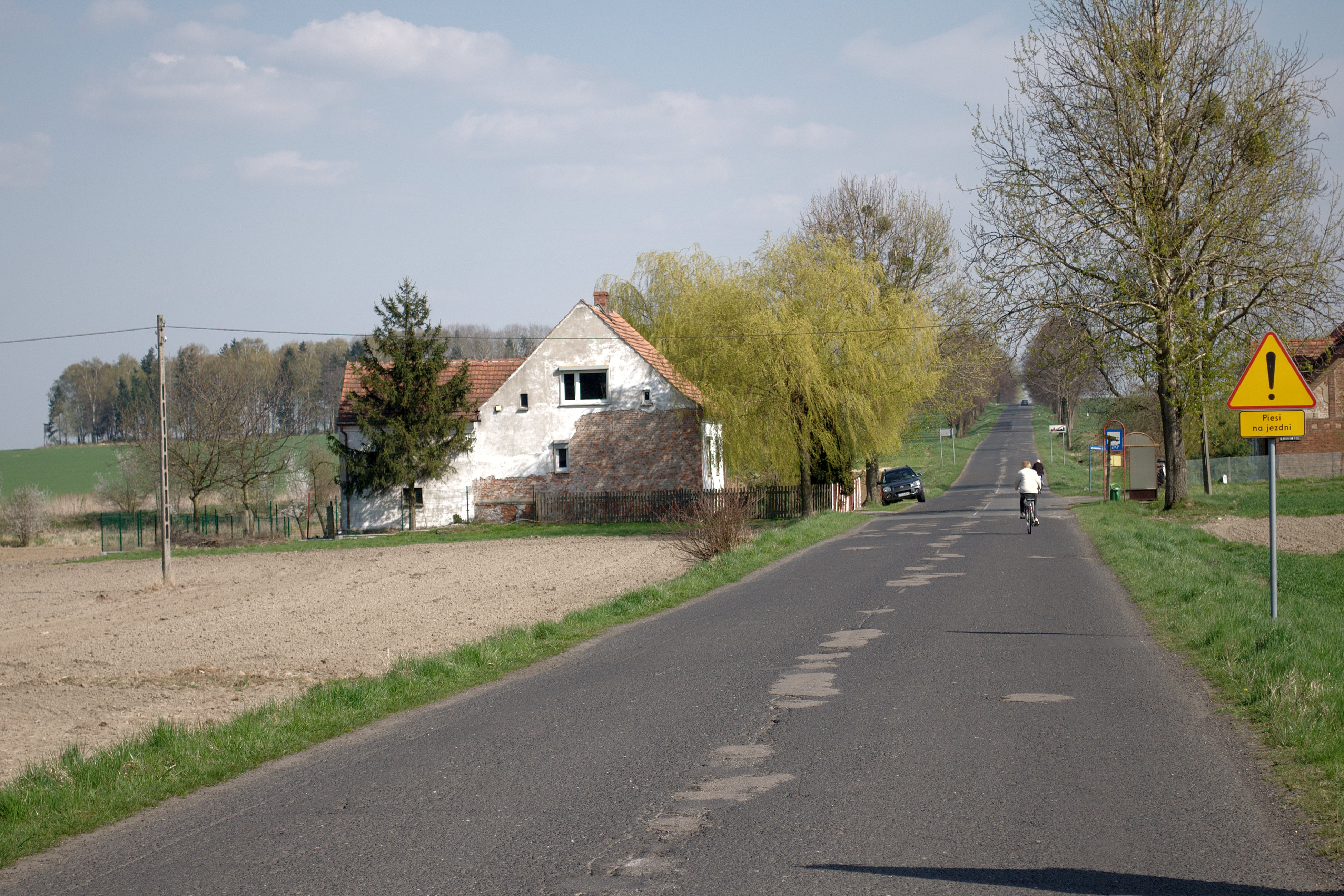 Wilkowice.